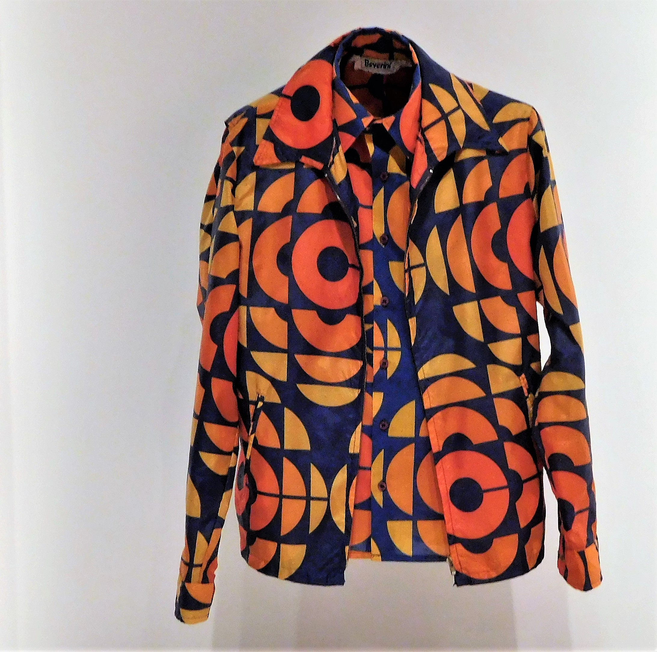 Chemisier et blouson créés par Jean-Claude Poitras pour les animateurs de la télévision de Radio-Canada lors des Jeux olympiques de 1976 à Montréal, exposés au Musée de la civilisation Manufacturier : Beverini inc. Coton, polyester et acétate